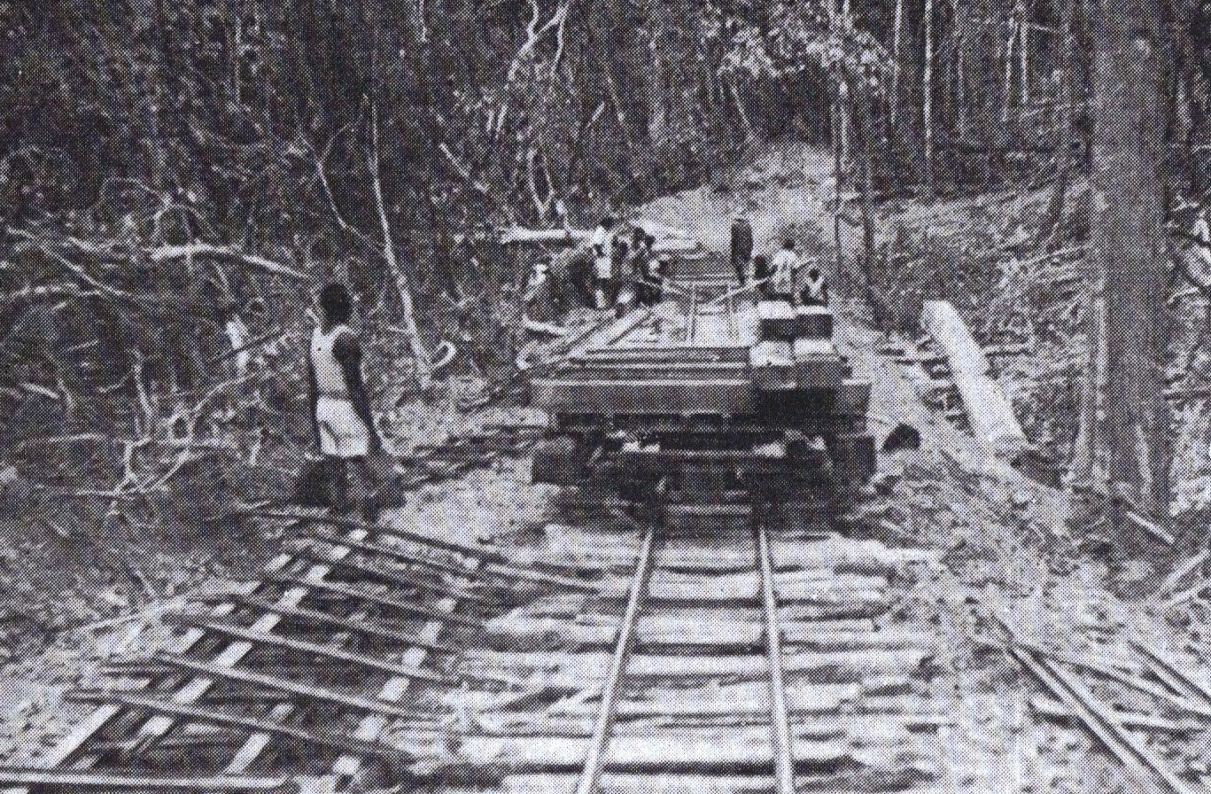 Une entreprise coloniale et ses travailleurs: la Société du Haut-Ogooué et la main d’œuvre africaine